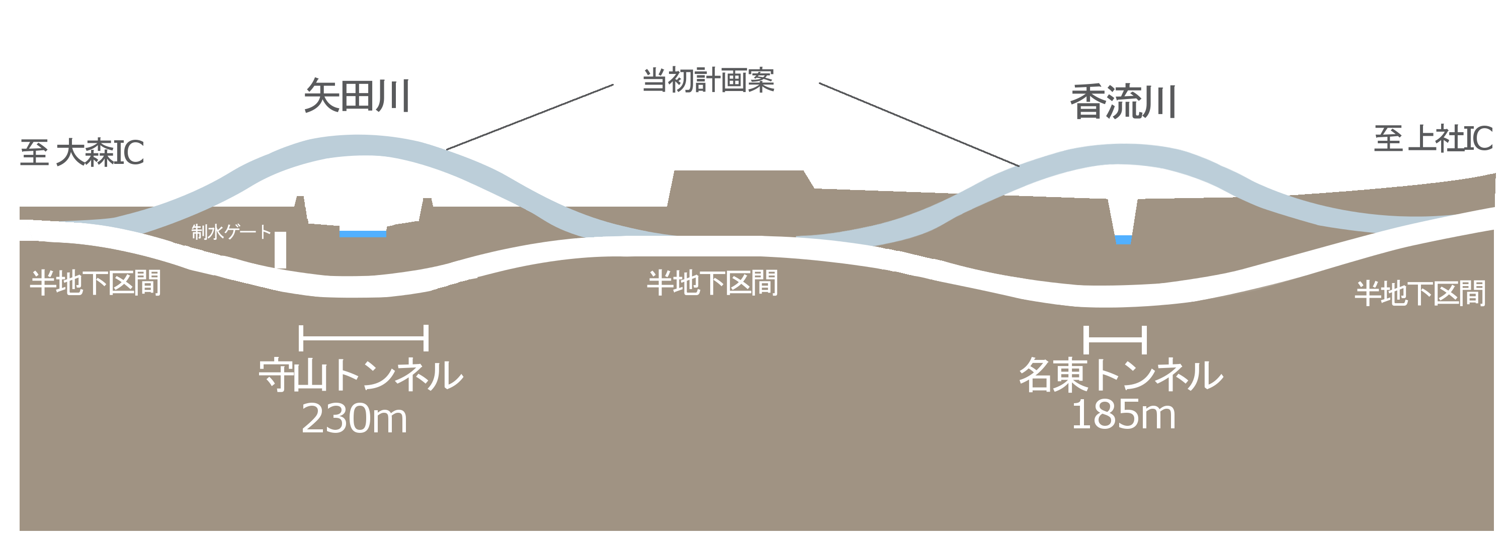 名古屋環状2号線専用部の香流川、矢田川渡河区間の当初計画案